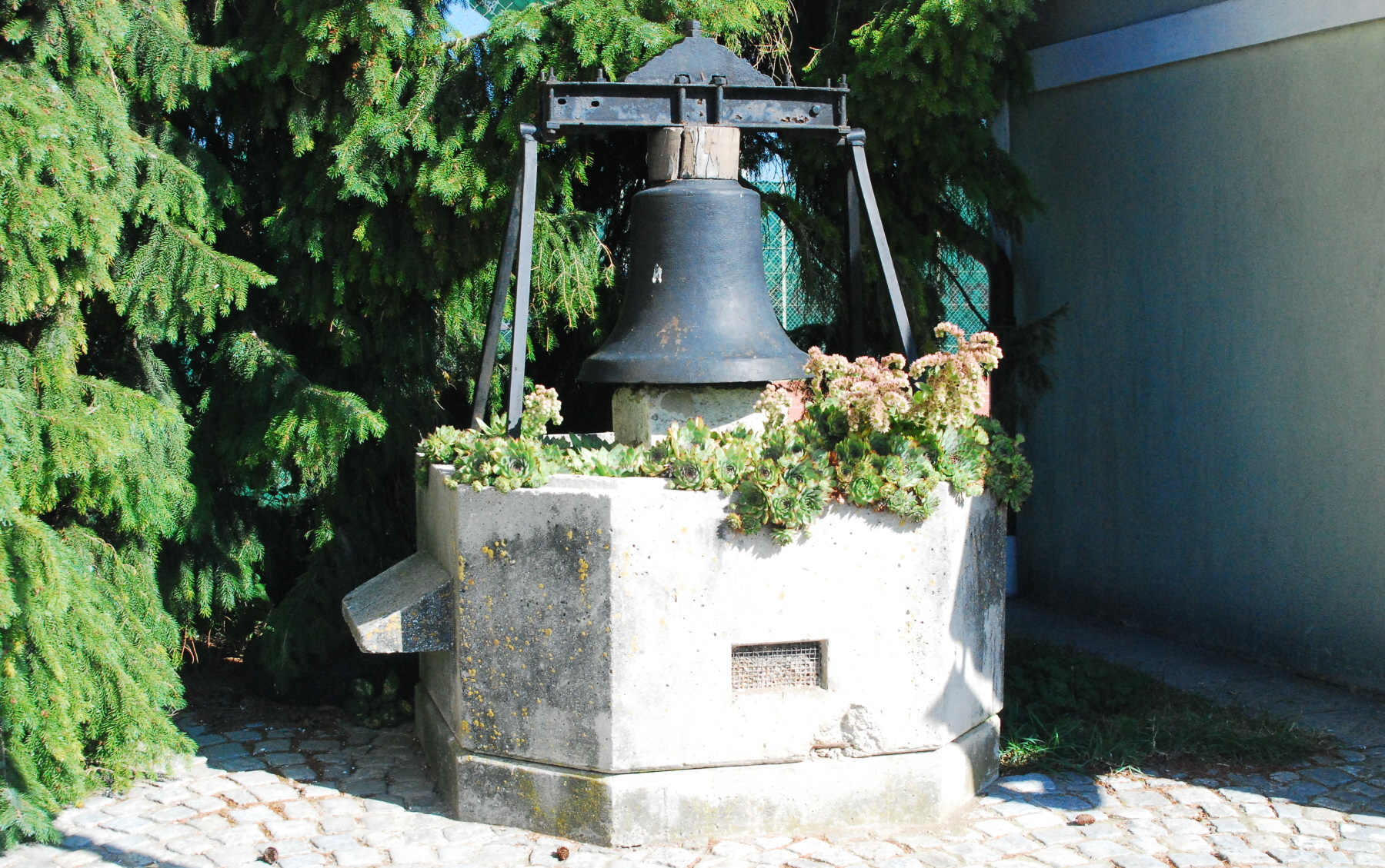 Glocke vor der Ortskapelle von Amelsdorf in Niederösterreich